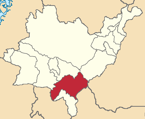 Mapa localizacor del cantón en Azuay, Ecuador